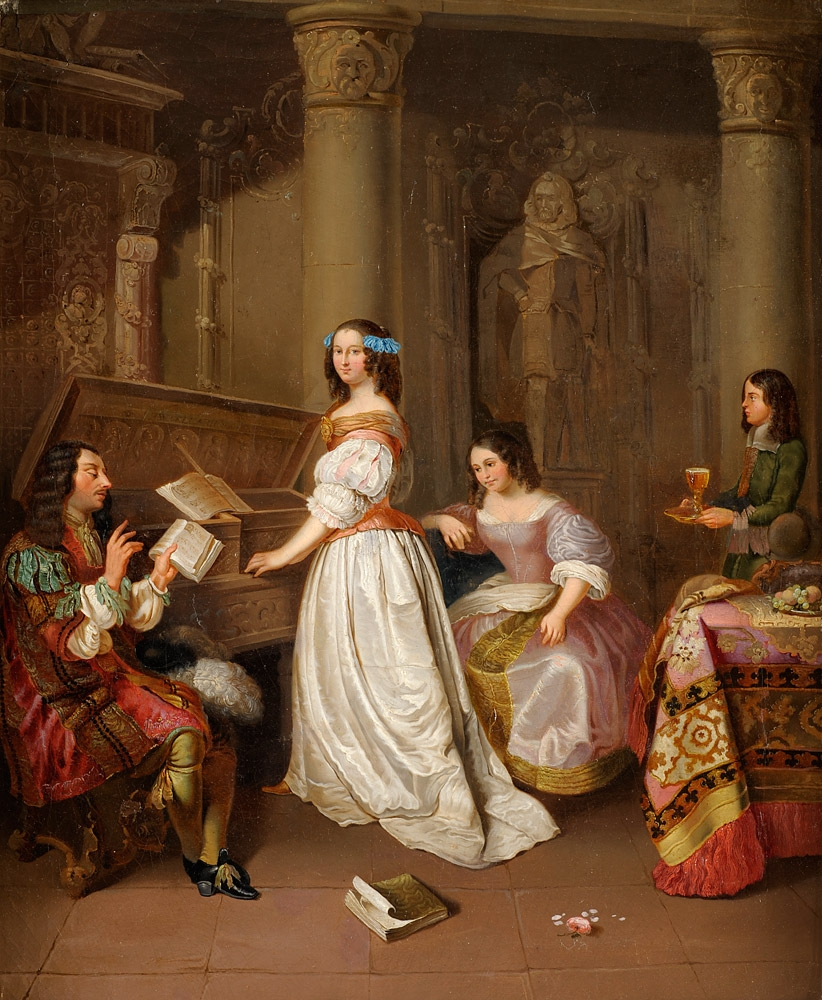 Musikalisches Intermezzo im Schloss. Signiert. Datiert 1845. Öl auf Leinwand, 56,5 x 47,5 cm.